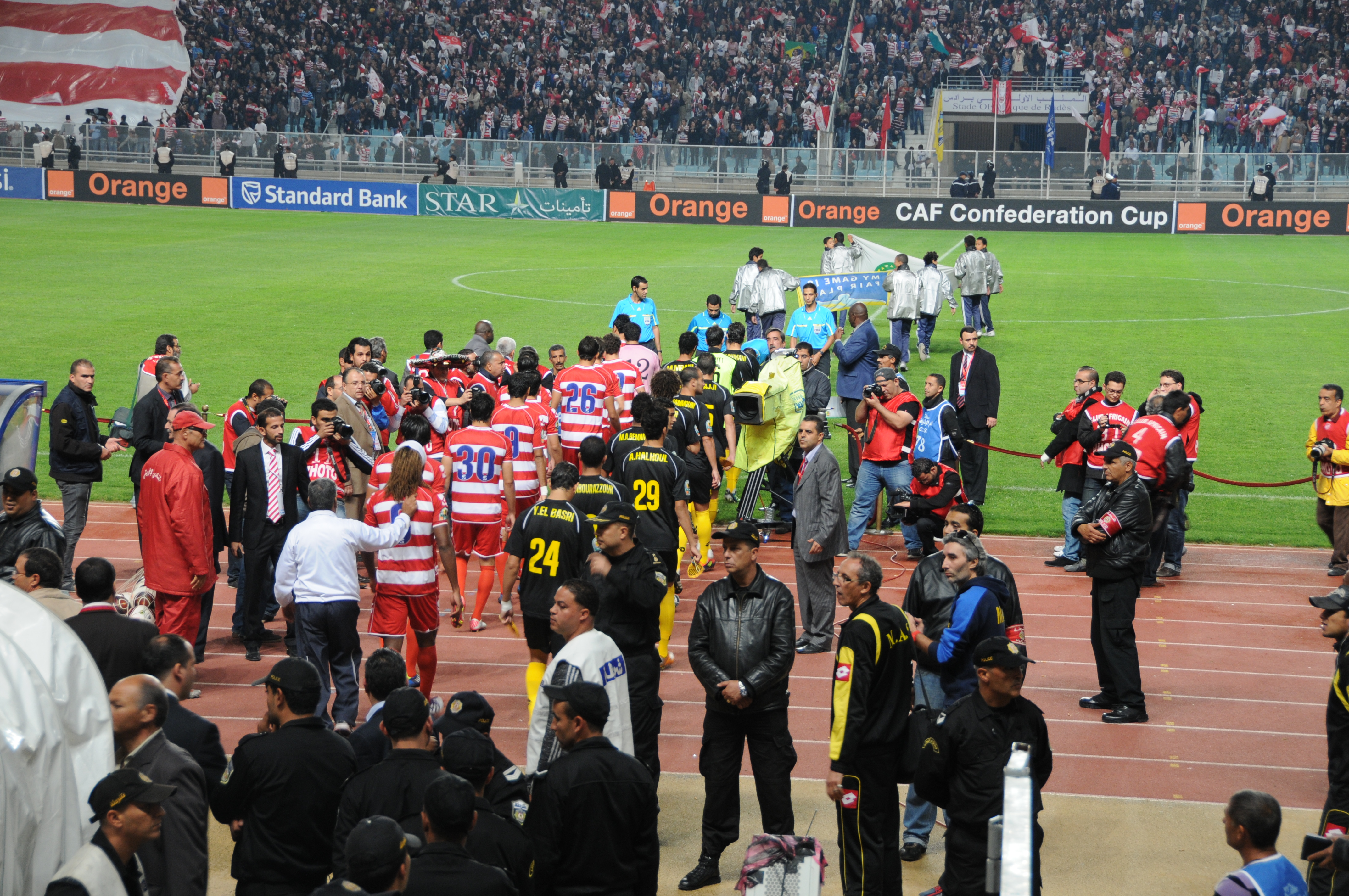 Match de Football en champion ligue entre le CA tunisien et le MAS marocain de Fès.